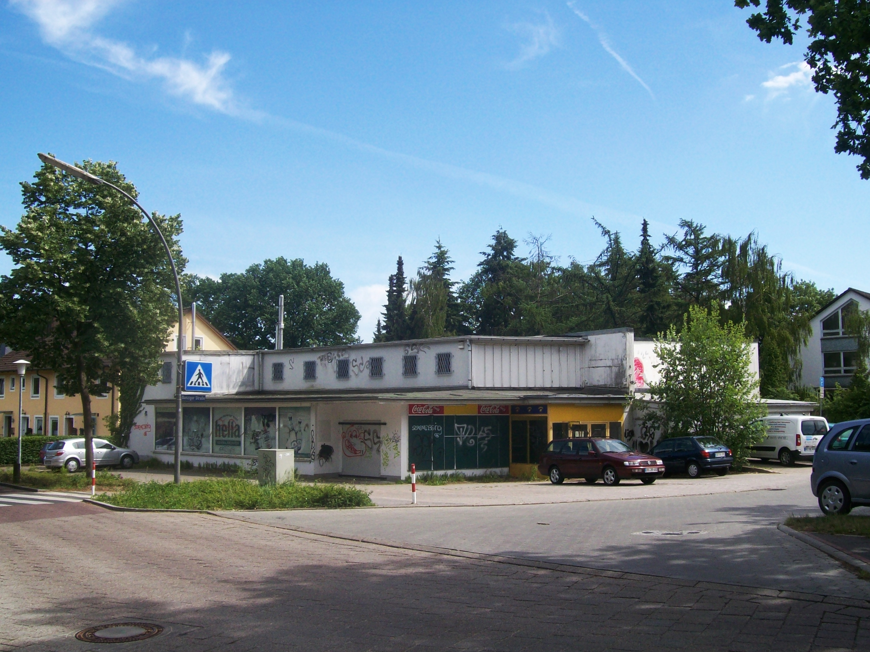 Ehemaliges Kino "Carpe diem" - späterer Pro-Markt und Getränkemarkt - in Reinbek kurz vor dem Abriss